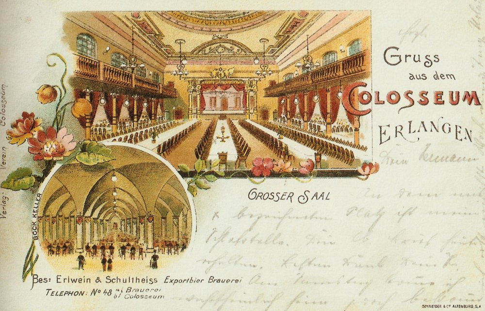 Erlangen. Großer Saal und Bockbierkeller im ehemaligen Colossium (auch Kolosseum) in der Henkestraße 28. Später mehrfach umgebaut, seit 1964 stand das Haus leer. Seit 1974 gehört das Gebäude zum Hotel Bayerischer Hof.